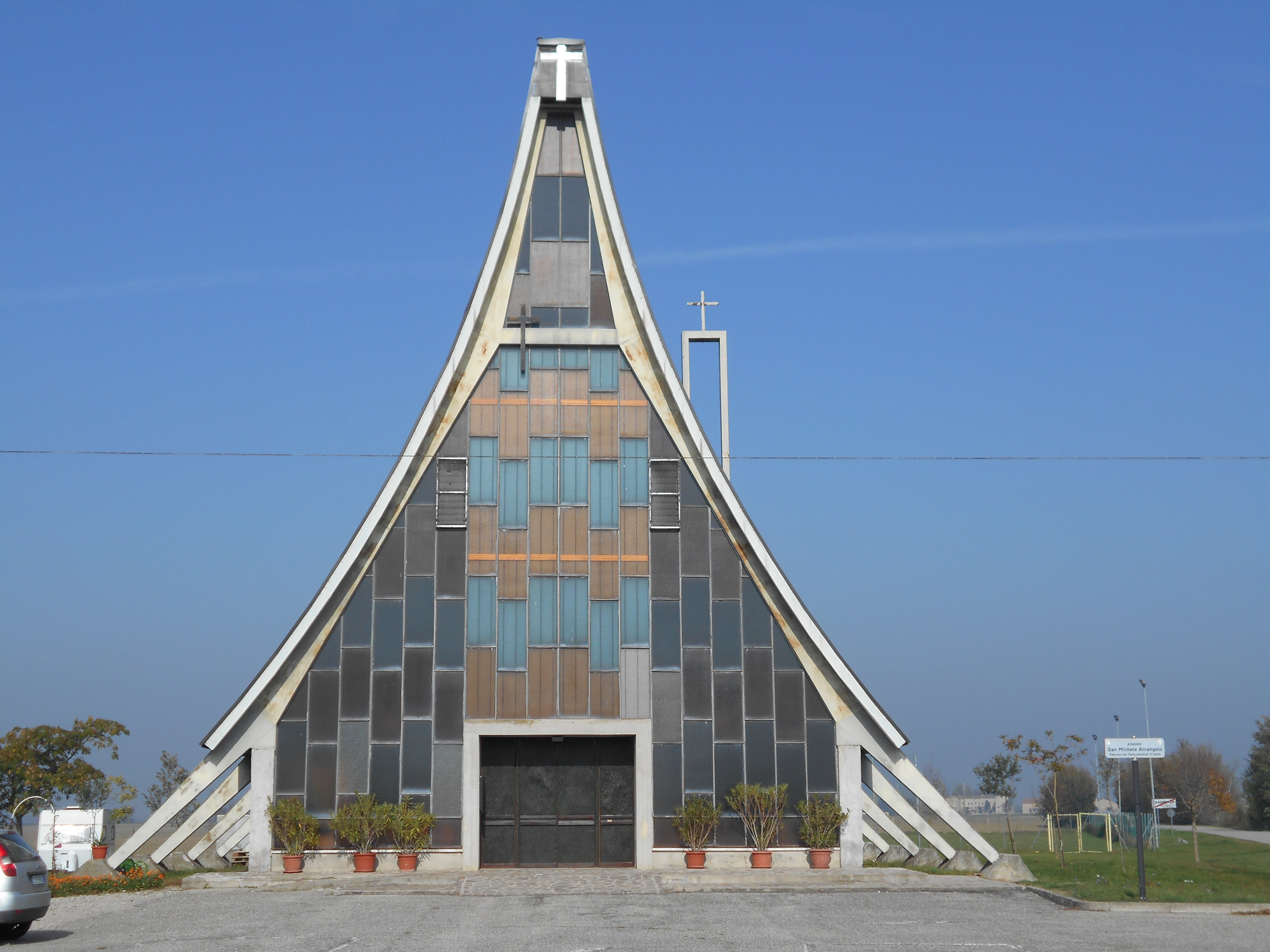 Parrocchia di Dragoncello Stoppiaro, Poggio Rusco